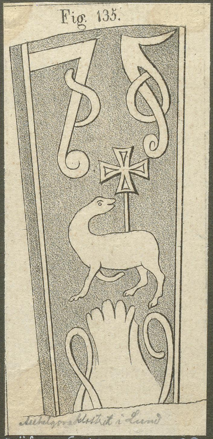 Raä-nr: Lund 44:1. Tidigmedeltida gravsten från klosterkyrkan, nu i Lunds univ. hist. museum. Illustration från N. H. Sjöborgs "Samlingar för Nordens fornälskare", del 1, fig 135, från 1822. Motiv: Lund 44:1 Kategori: Kloster, Teckning Raä-nr: Lund 44:1. Tidigmedeltida gravsten från klosterkyrkan, nu i Lunds univ. hist. museum. Illustration från N. H. Sjöborgs "Samlingar för Nordens fornälskare", del 1, fig 135, från 1822. Lund 44:1.